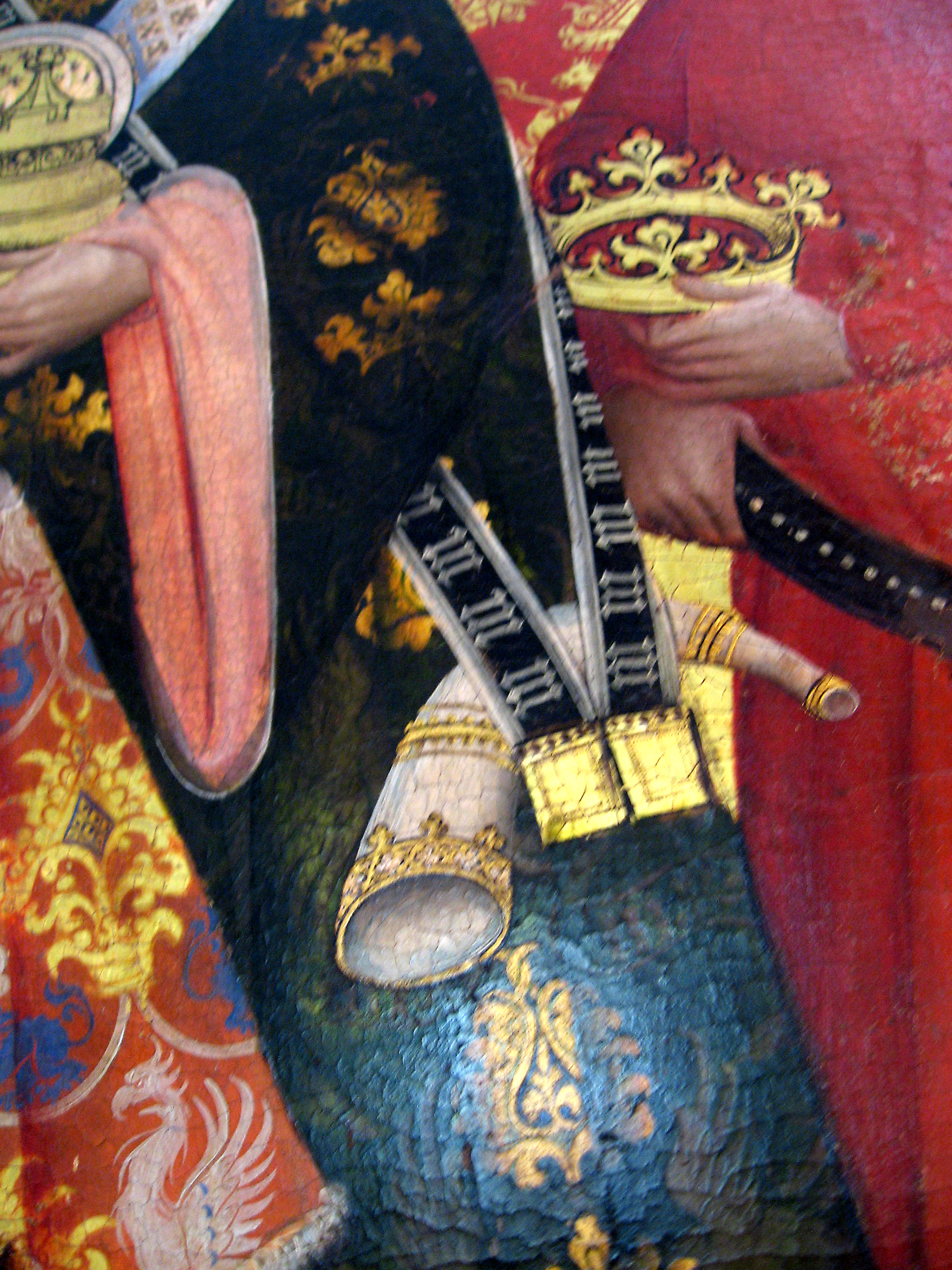 Marienaltar, rechte Tafel, Anbetung der Könige, Detail des Gewandes